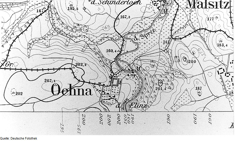 Original image description from the Deutsche Fotothek Bautzen-Oehna. Meßtischblatt, Sekt. Luttowitz, 1884